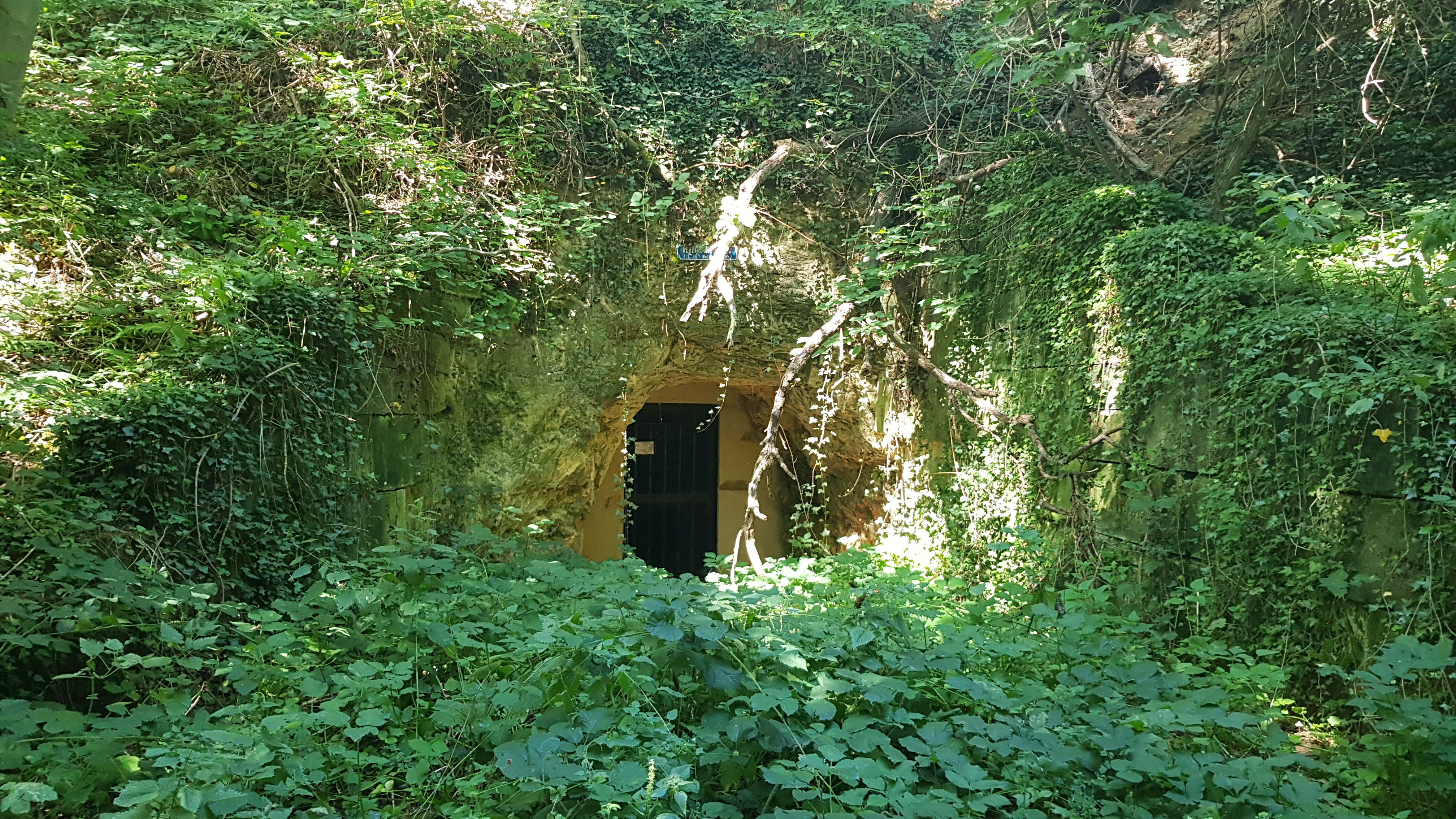 Scheuldergroeve I, Scheulder, Nederland